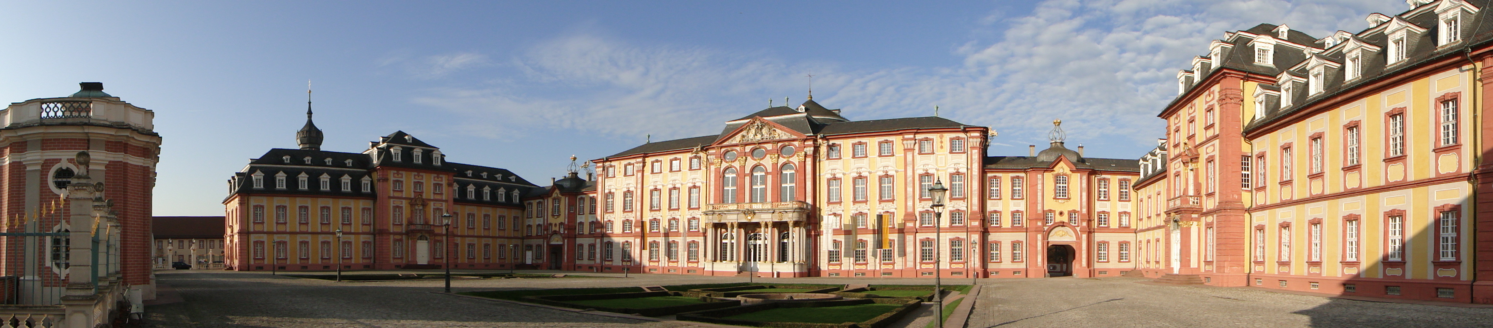 Bruchsal